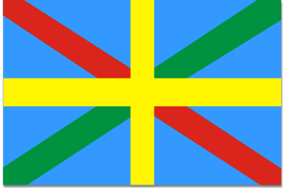 La bandera de Tazacorte es de color azul, dividido por dos franjas diagonales que se cruzan en el centro, de color rojo la que une el vértice superior del asta con el vértice inferior del batiente, y de color amarillo la otra. En el centro, superpuesta a ambas, una cruz amarilla cuyos extremos se extienden hasta el borde del paño.